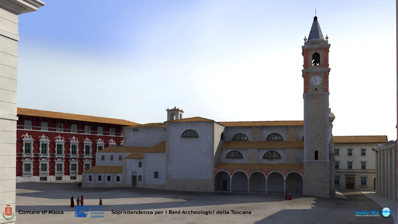 Rendering della veduta della chiesa di San Pietro di Massa come poteva risultare intorno al 1790, veduta da Via Dante con lo sfondo del Palazzo Ducale